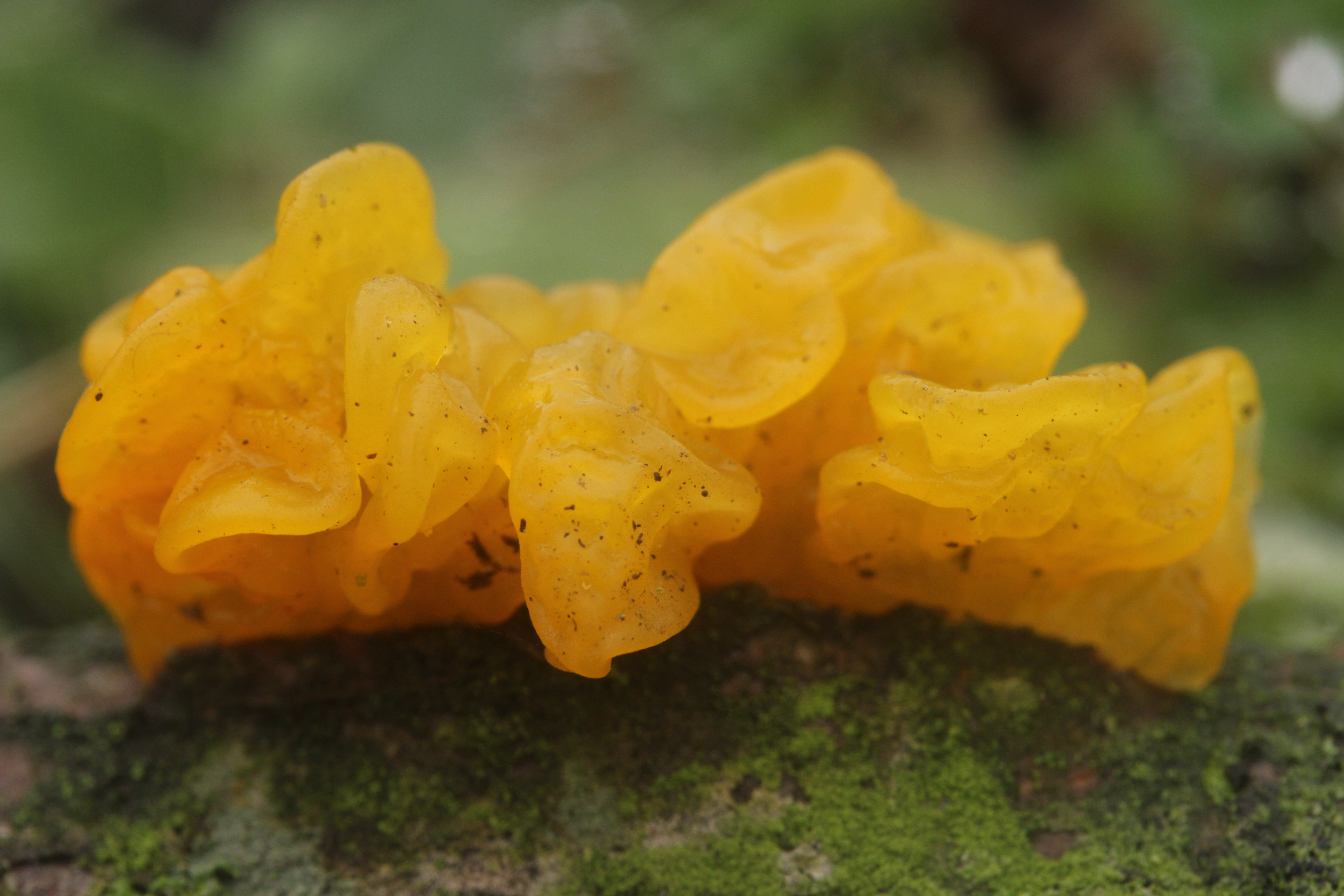 Yellow Brain - Tremella mesenterica